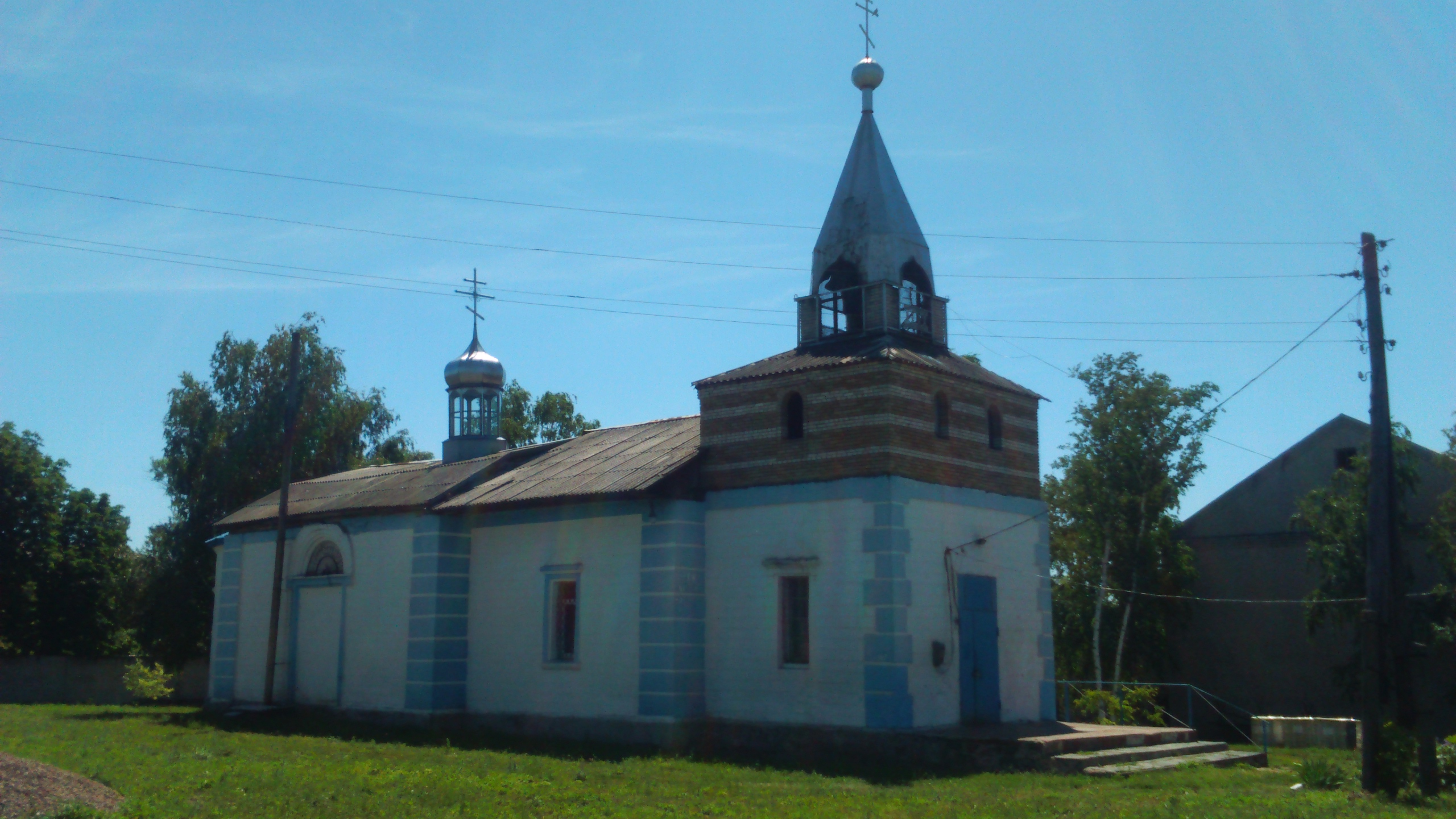 Добропі́лля — село в Україні, Добропільському районі Донецької області, над річкою Водяна.